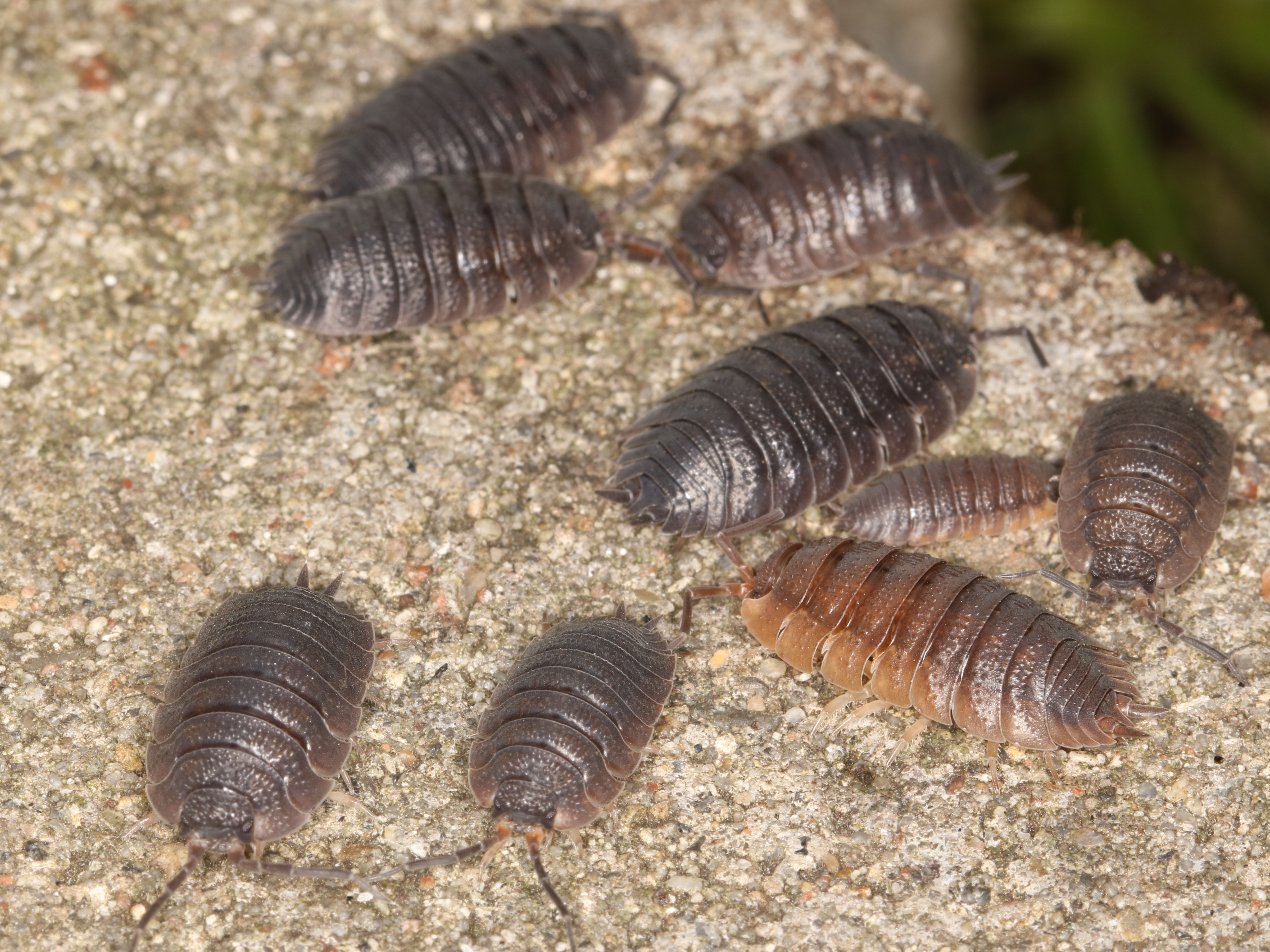 Porcellio scaber Latreille, 1804, Søborg, Denmark, 25 June 2015